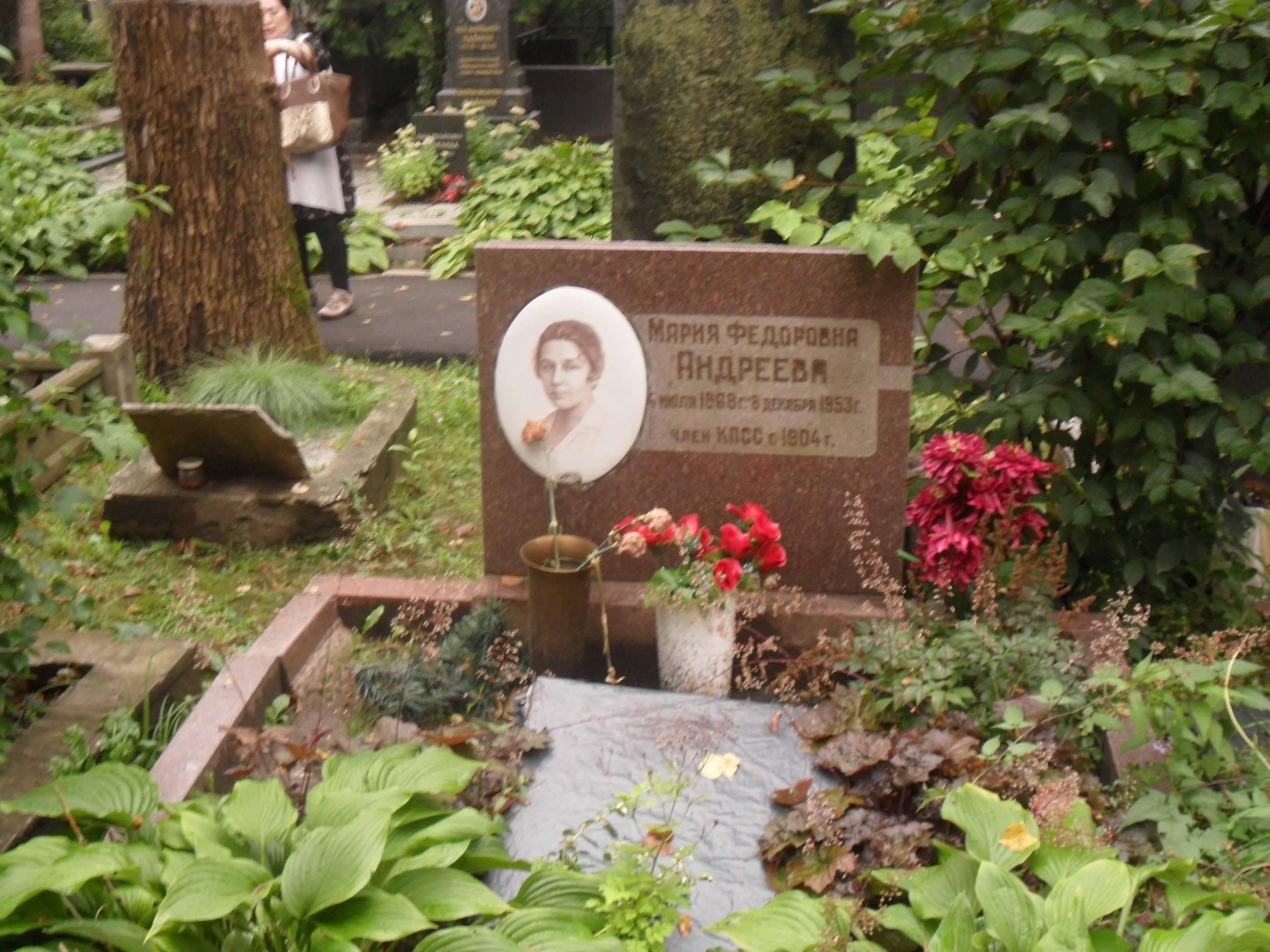 Могила жены писателя Максима Горького Марии Андреевой на Новодевичьем кладбище.